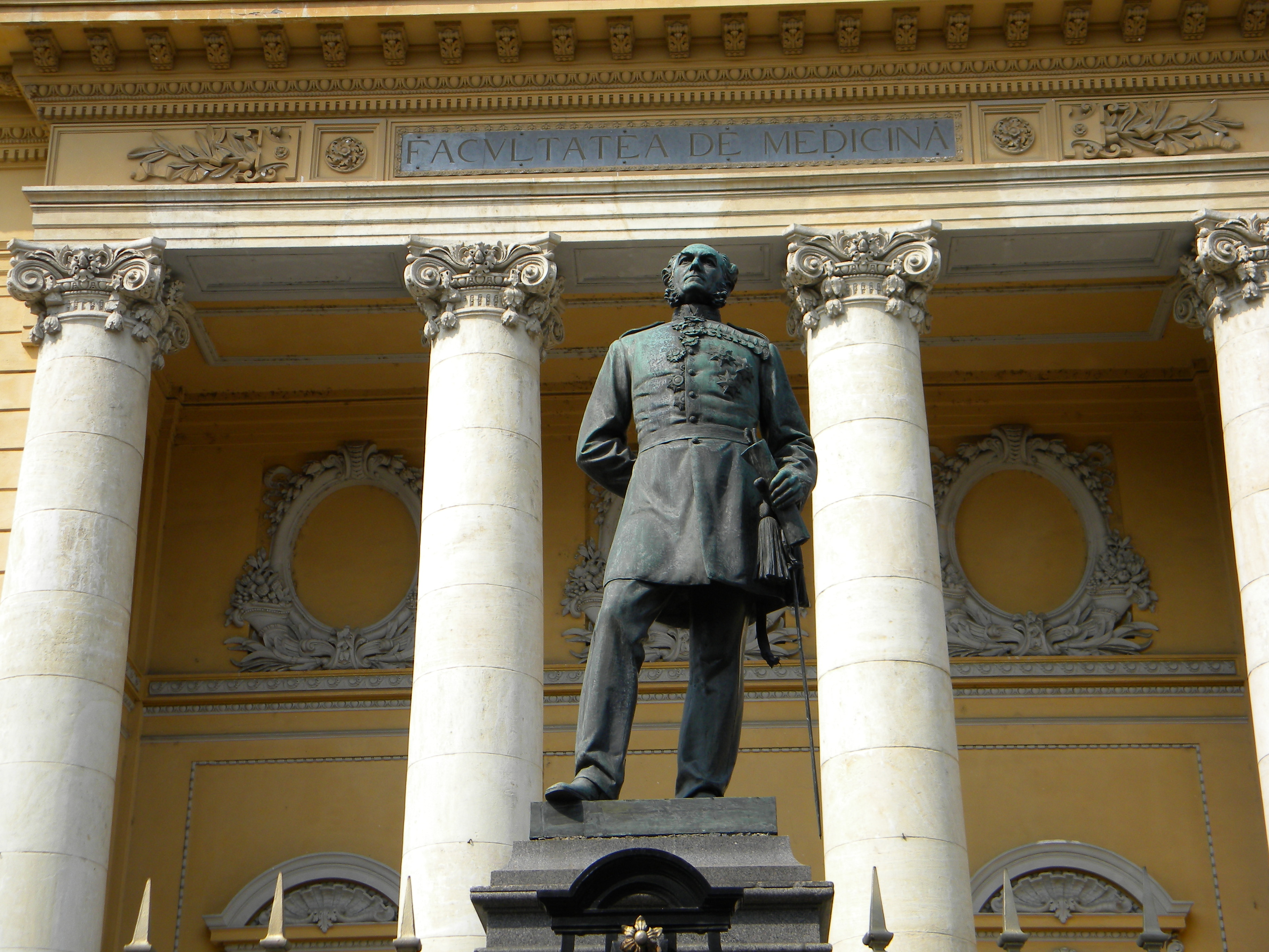 Universitatea de Medicina si Farmacie, Bd. Eroii Sanitari nr. 8, sect. 5, Bucuresti si Statuia lui Carol Davila B-III-m-B-19981; (2)